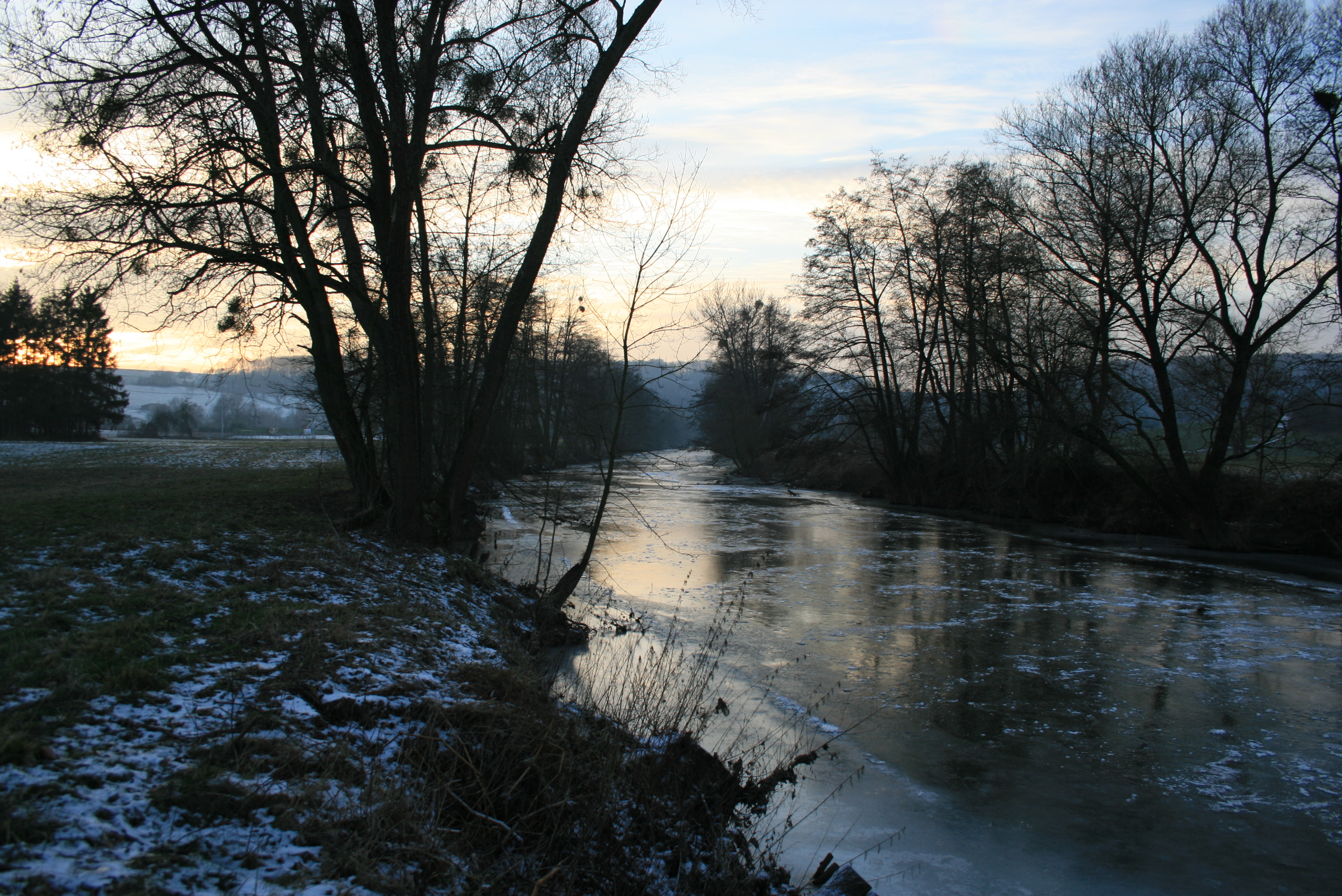 Die zugefrorene Blies im januar 2009, flussabwärt zwischen Frauenber und Bliesmengen-Bolchen.